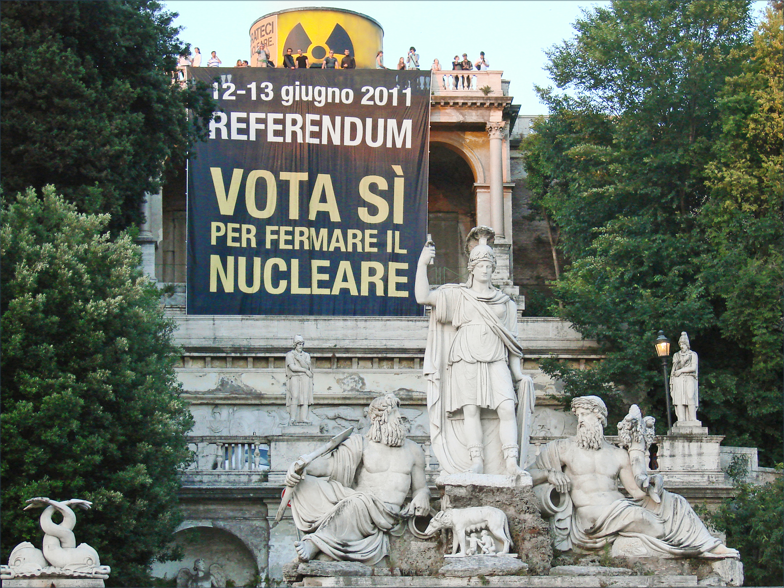 Propagande antinucléaire avant le référendum.Affiche et stand de Greenpeace sur la terrasse du Pincio en faveur de l'arrêt du nucléaire en Italie. Le vote a été en faveur d'un arrêt du nucléaire. Sous la bache, la fontaine de la piazza del Popolo représentant Rome entre le Tibre (à gauche) et l'Aniene (à droite).